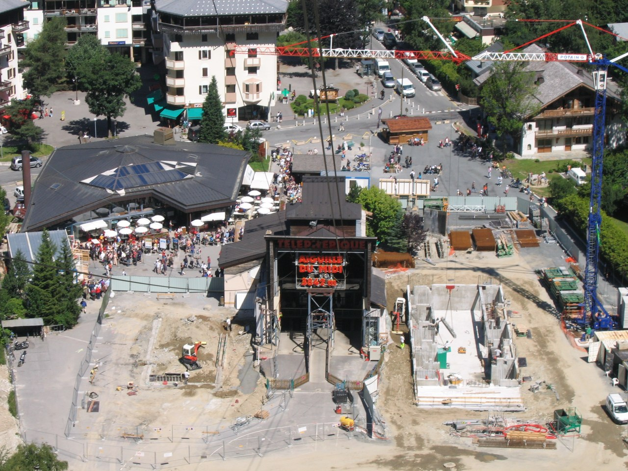 Widziana z wagonika dolna stacja kolejki linowej na Aiguille du Midi.